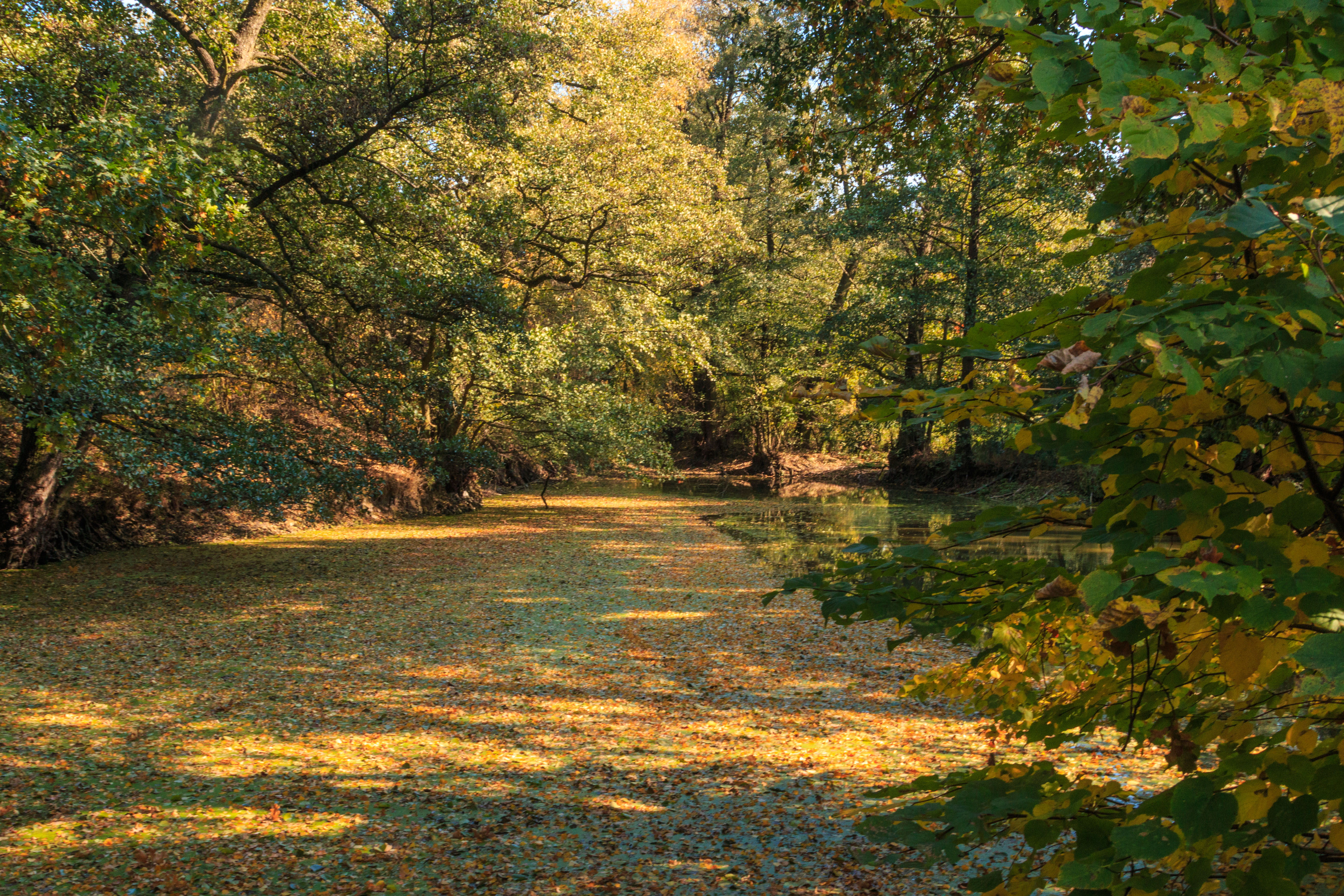 Hluboké jezero - mrtvé rameno Orlice u Hradce Králové Project: Vodstvo.